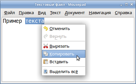 Контекстное меню выделенного текста в редакторе Mousepad (Xfce).